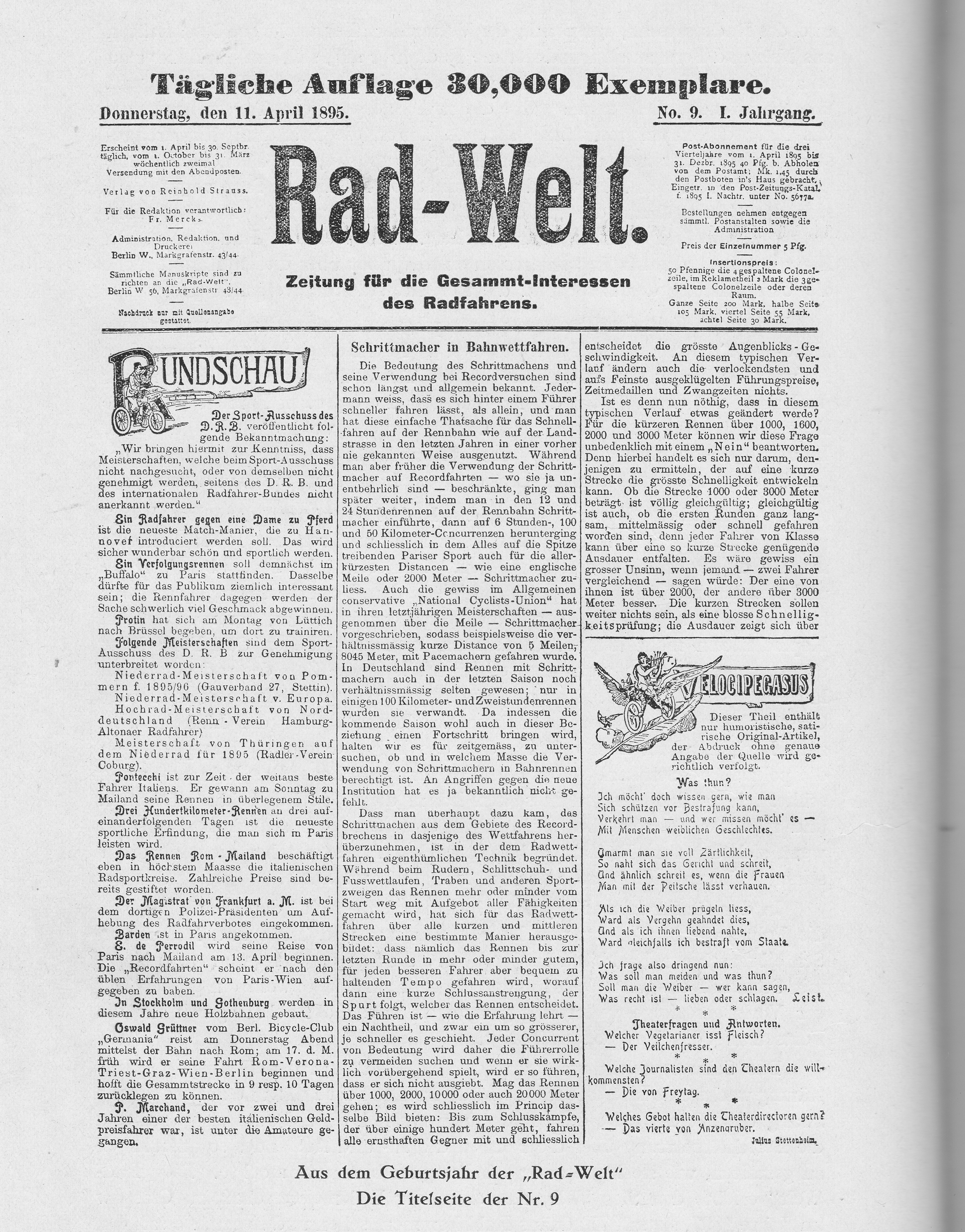 Erste Seite der Rad-Welt vom 11. April 1985